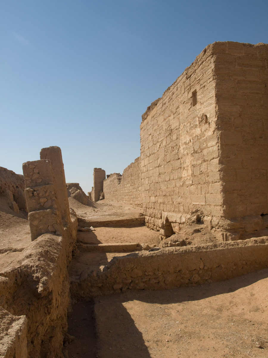 Rue du rempart au Sud de la domus ecclesiae à Doura Europos.